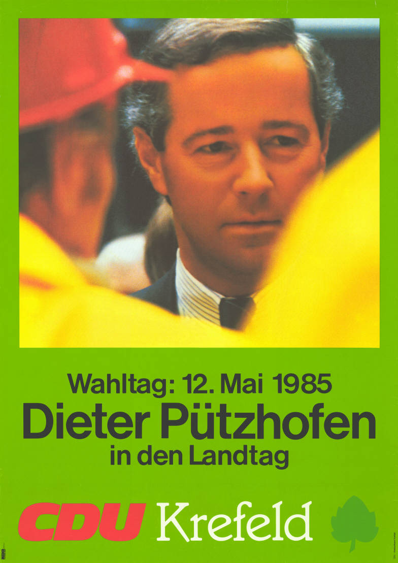 Wahltag: 12. Mai 1985 Dieter Pützhofen in den Landtag CDU Krefeld Abbildung: Pützhofen im Gespräch Plakatart: Kandidaten-/Personenplakat mit Porträt Auftraggeber: CDU-KV Krefeld Drucker_Druckart_Druckort: Meder Druckerei GmbH, Krefeld Objekt-Signatur: 10-009 : 928 Bestand: Landtagswahlplakate Nordrhein-Westfalen (10-009) GliederungBestand10-18: Landtagswahlplakate Nordrhein-Westfalen (10-009) » CDU Lizenz: KAS/ACDP 10-009 : 928 CC-BY-SA 3.0 DE